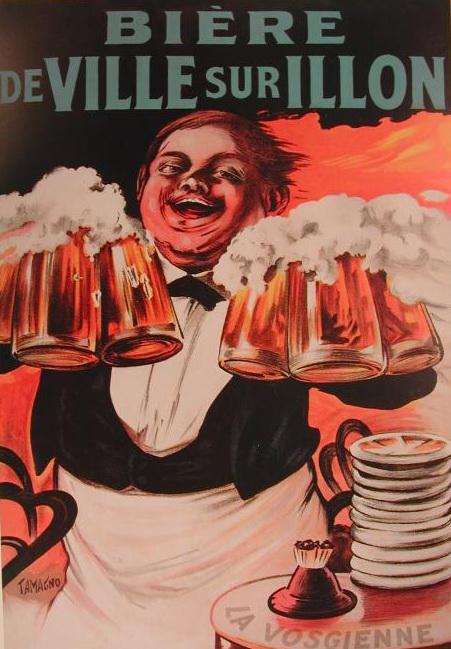 Affiche bière de Ville sur Illon